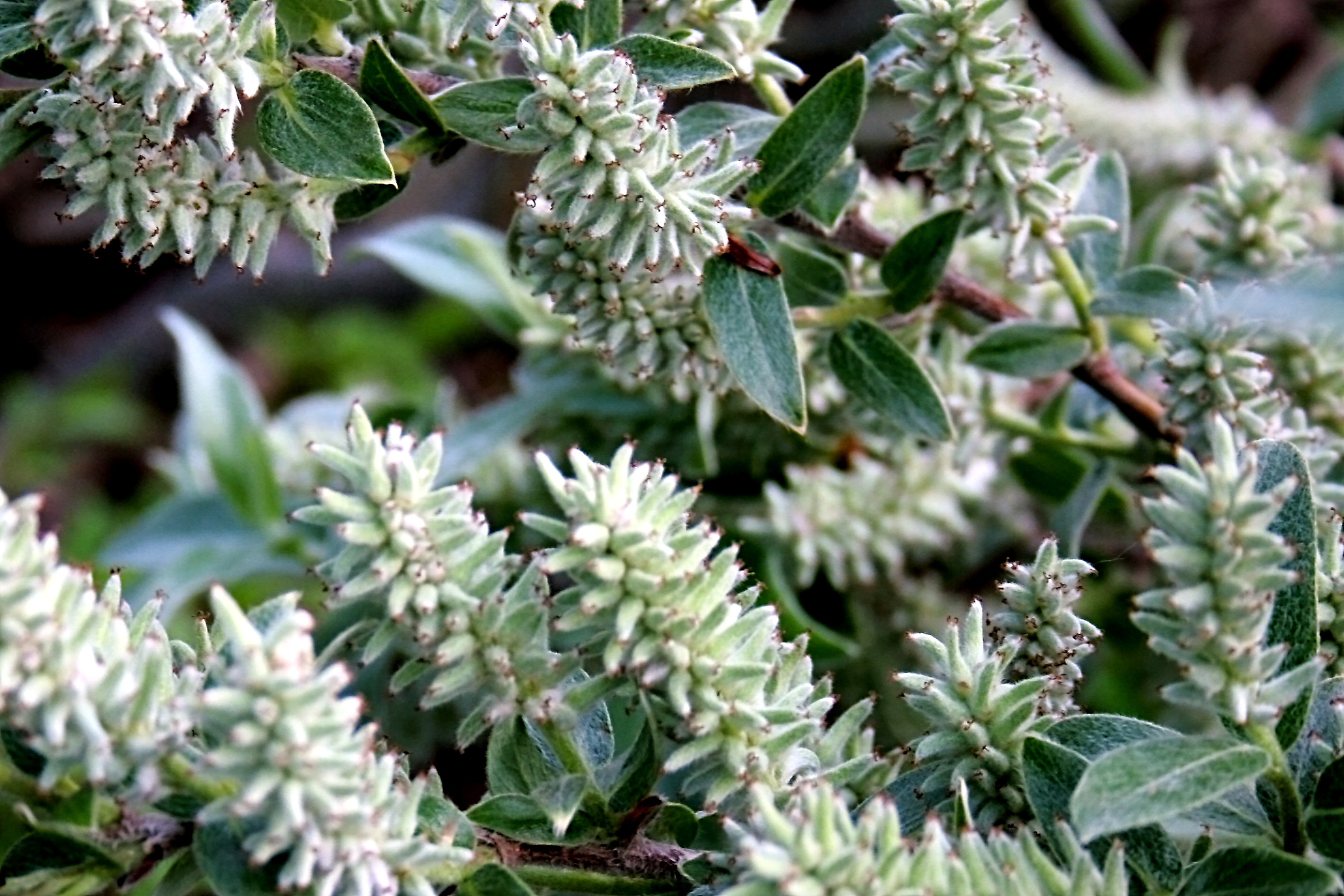 Ísland, Akureyri Botanical Gardens: Seiden-Weide Salix_glaucosericea